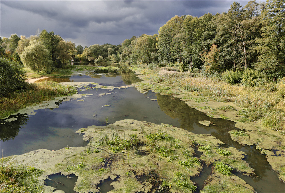 Мар'іна Горка. Рака Цітаўка